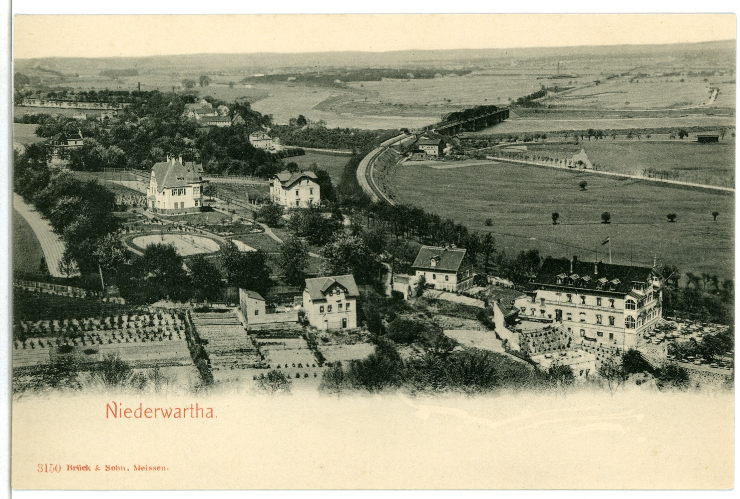 Niederwartha; Blick auf Niederwartha This postcard is from publisher Brück & Sohn in Meißen ( postcard has a unique number 03150 and is available in a higher resolution at the publisher. This images was uploaded in a cooperation project between Wikipedians and the publisher.